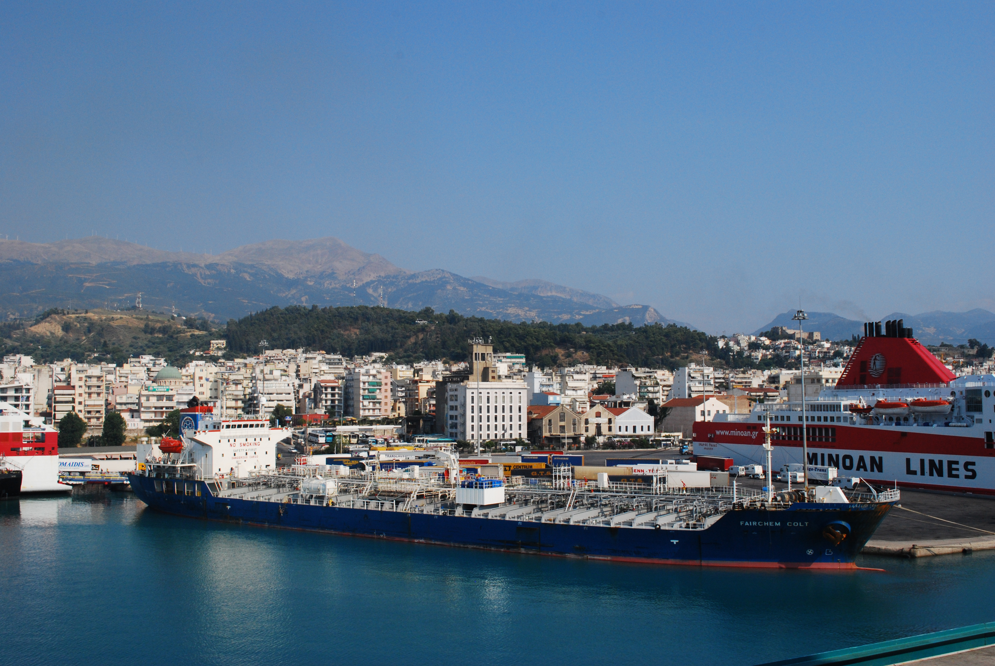 Le port de Patras en Grèce en août 2009.